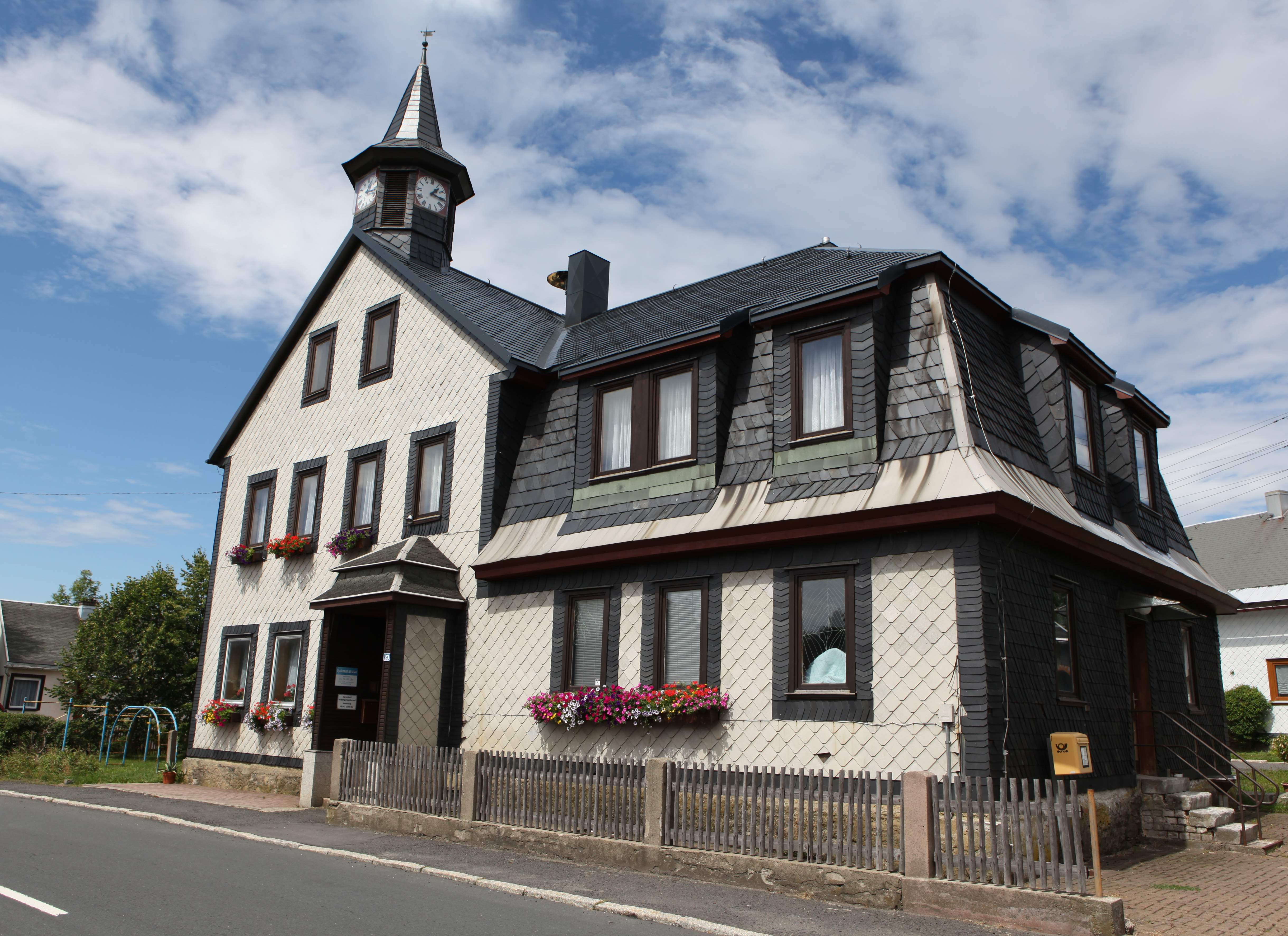 Heimatstube in Siegmundsburg im Thüringer Wald